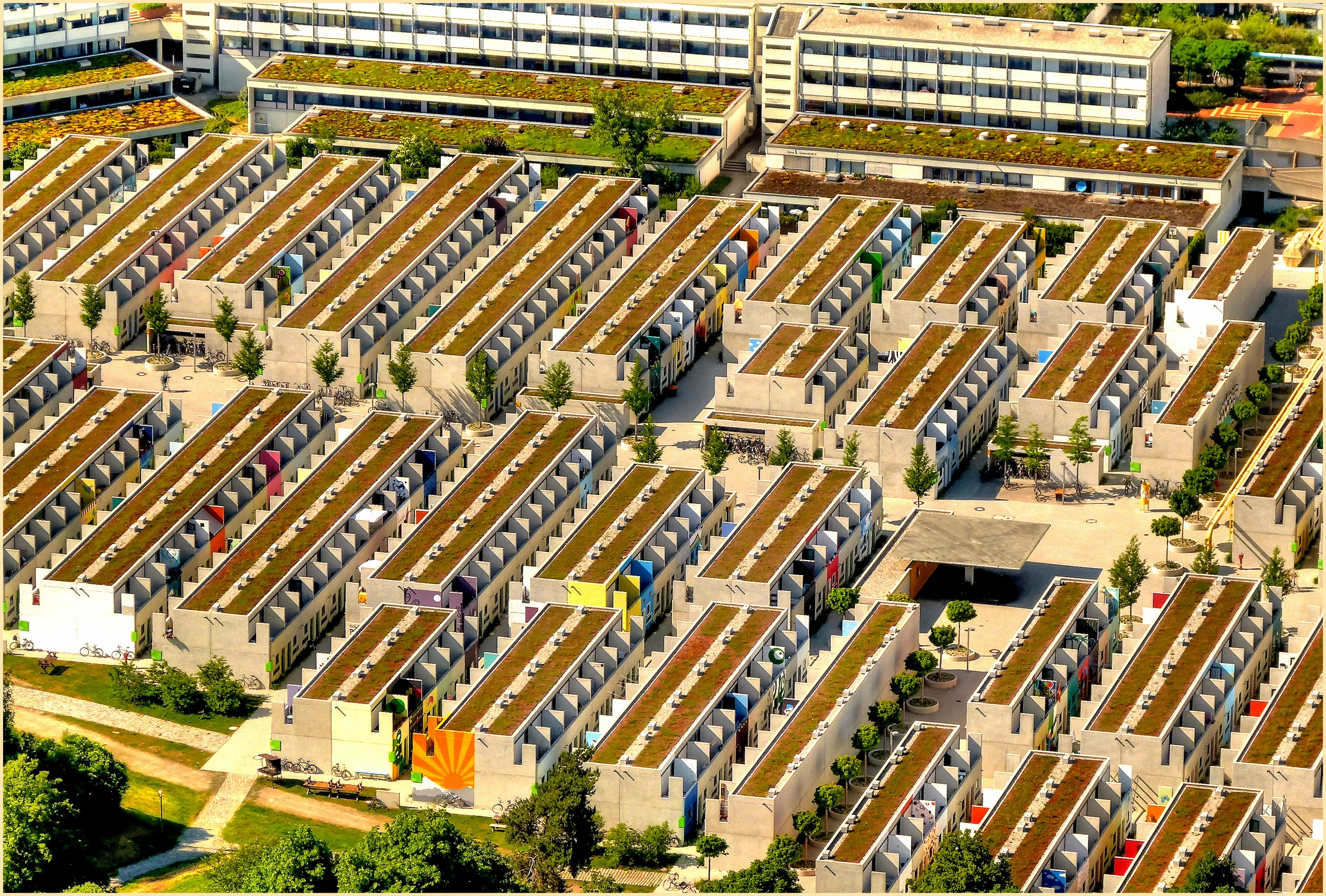 Studentenwohnungen, fotografiert vom FernsehturmThis is a photograph of an architectural monument.